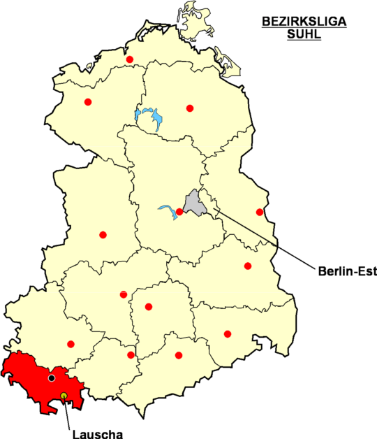 Localisation de Lauscha dans la "Bezirksliga Suhl" Catégorie:Logo de clubs de football - Allemagne